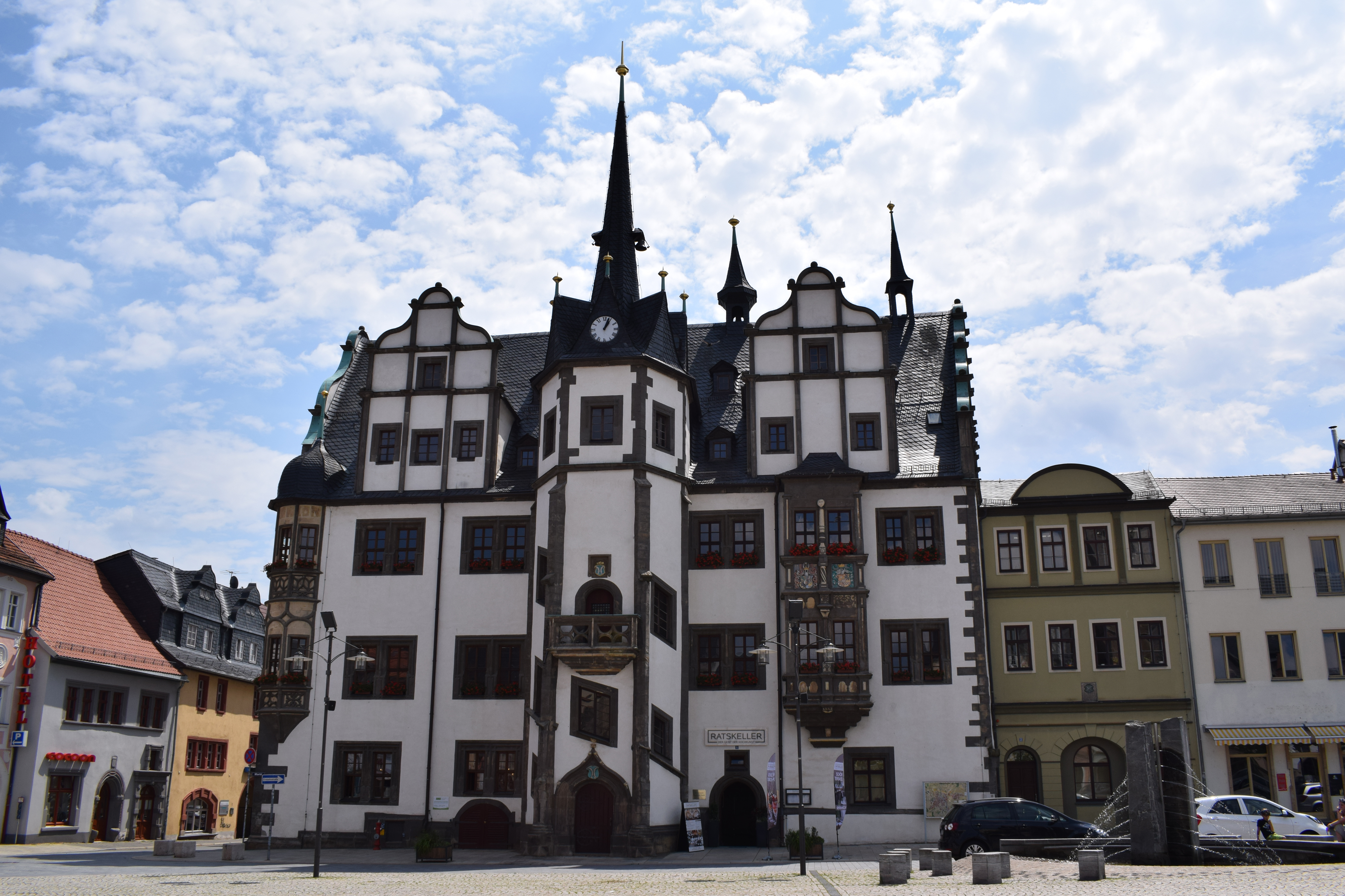 Das Rathaus der Kreisstadt Saalfeld an der Saale.